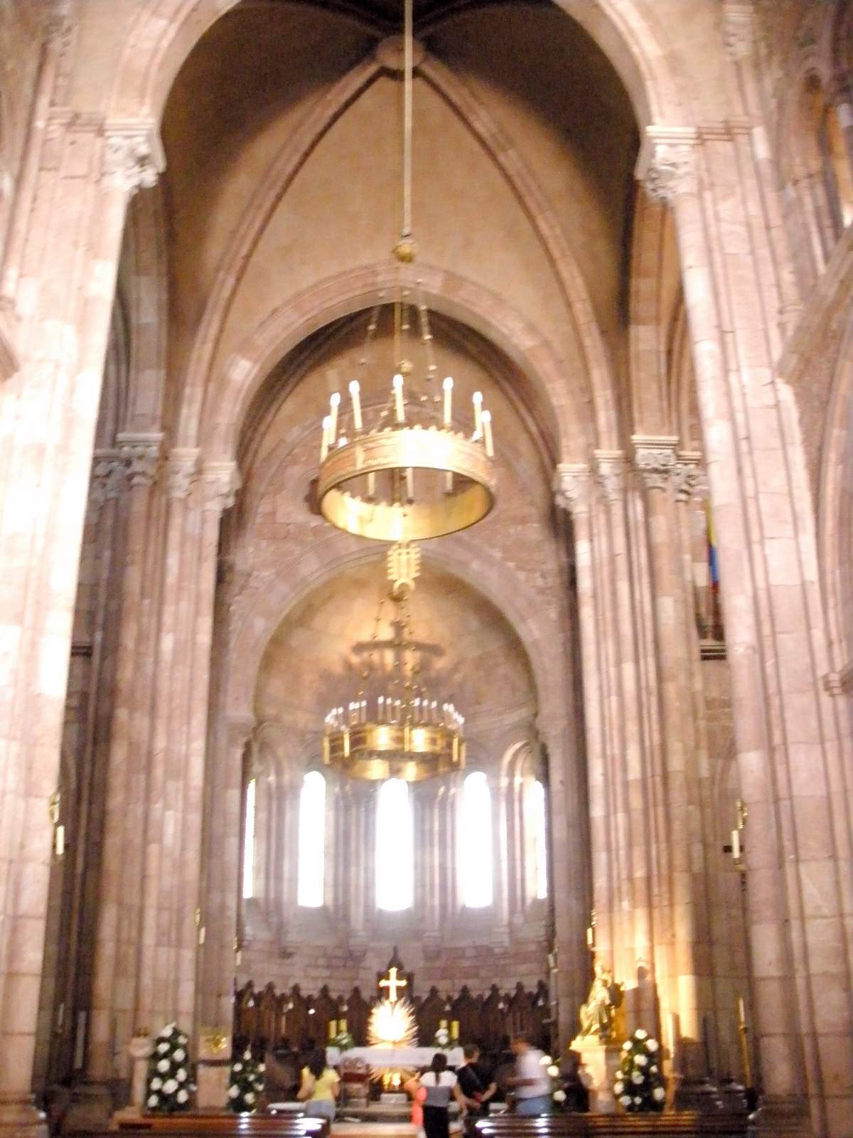 Basílica de Santa María la Real de Covadonga (Asturias)